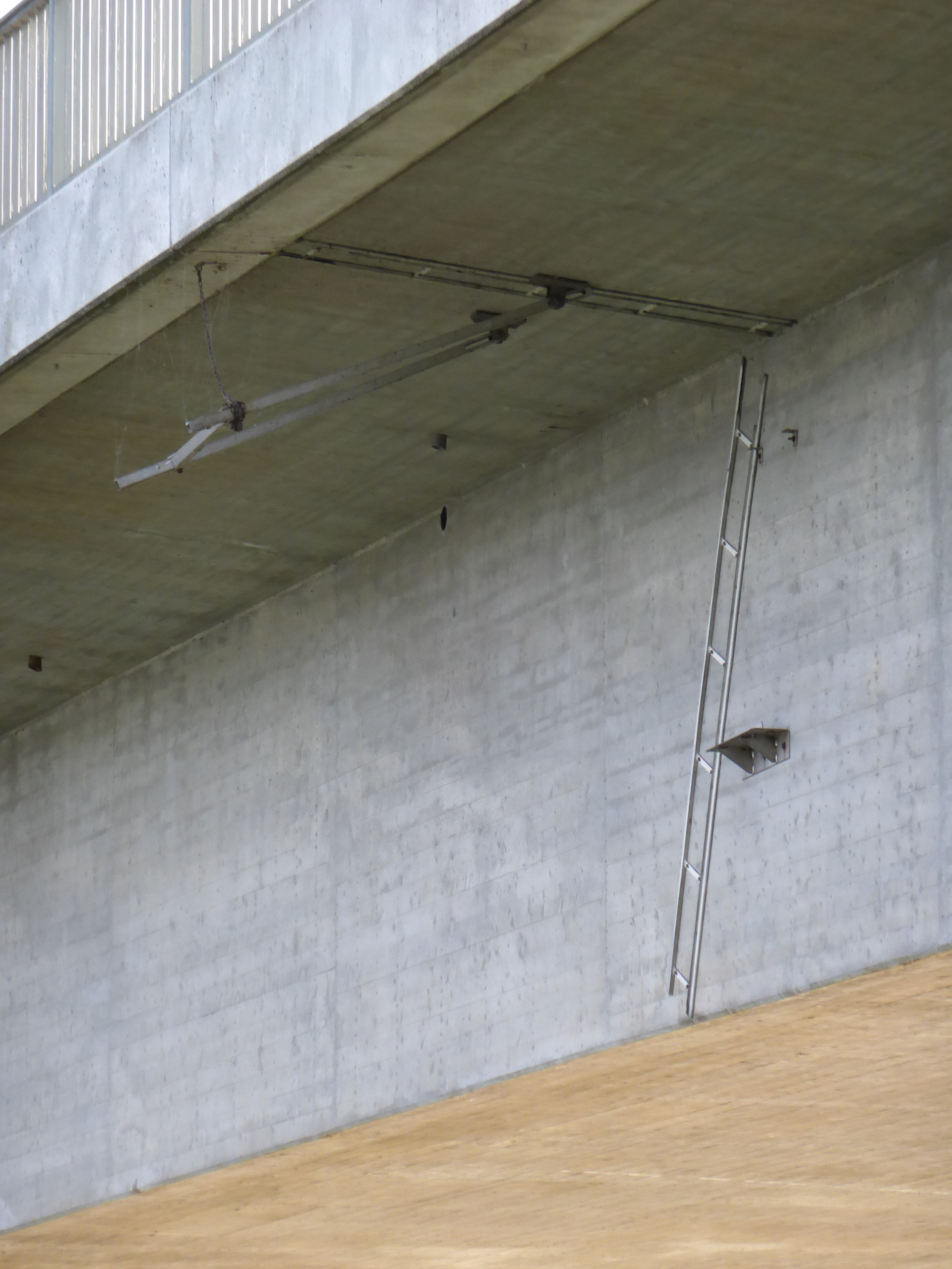 Halterungen zum Anbringen von Schneidladungen an der Straßenbrücke über den Donauseitenkanal bei der Stauanlage Bad Abbach - Poikam. Mit Hilfe dieser Vorrichtung hätte im Kriegsfall der Überbau der Brücke gesprengt werden können (Blick auf die Ostseite der Brücke)